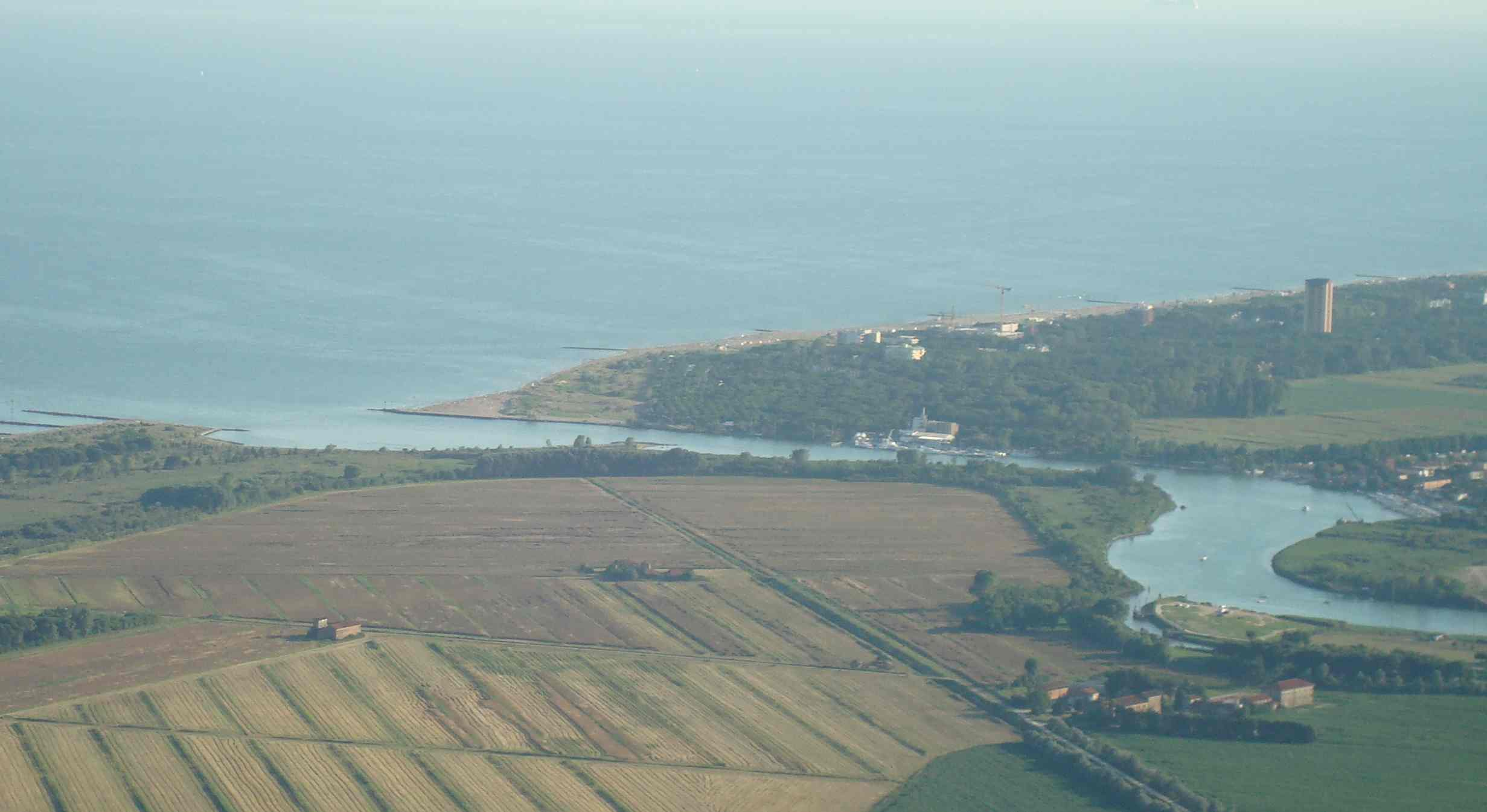 Foto delle Foci del Piave e Cortellazzo.